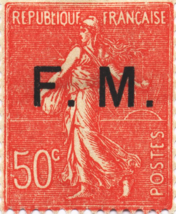 Type Semeuse lignée surchargé FM (Franchise militaire)